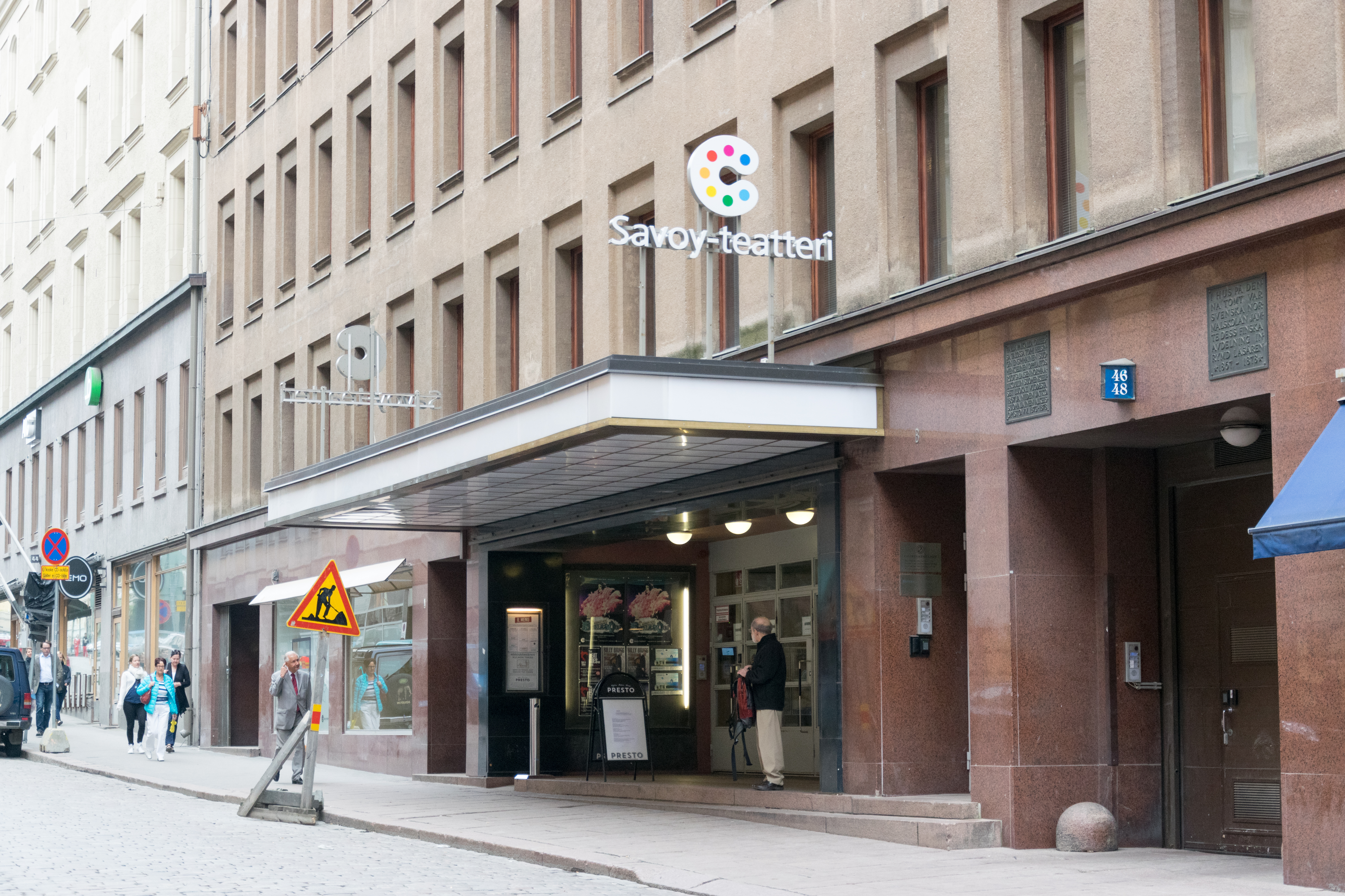 Savoy teatteri helsingissä